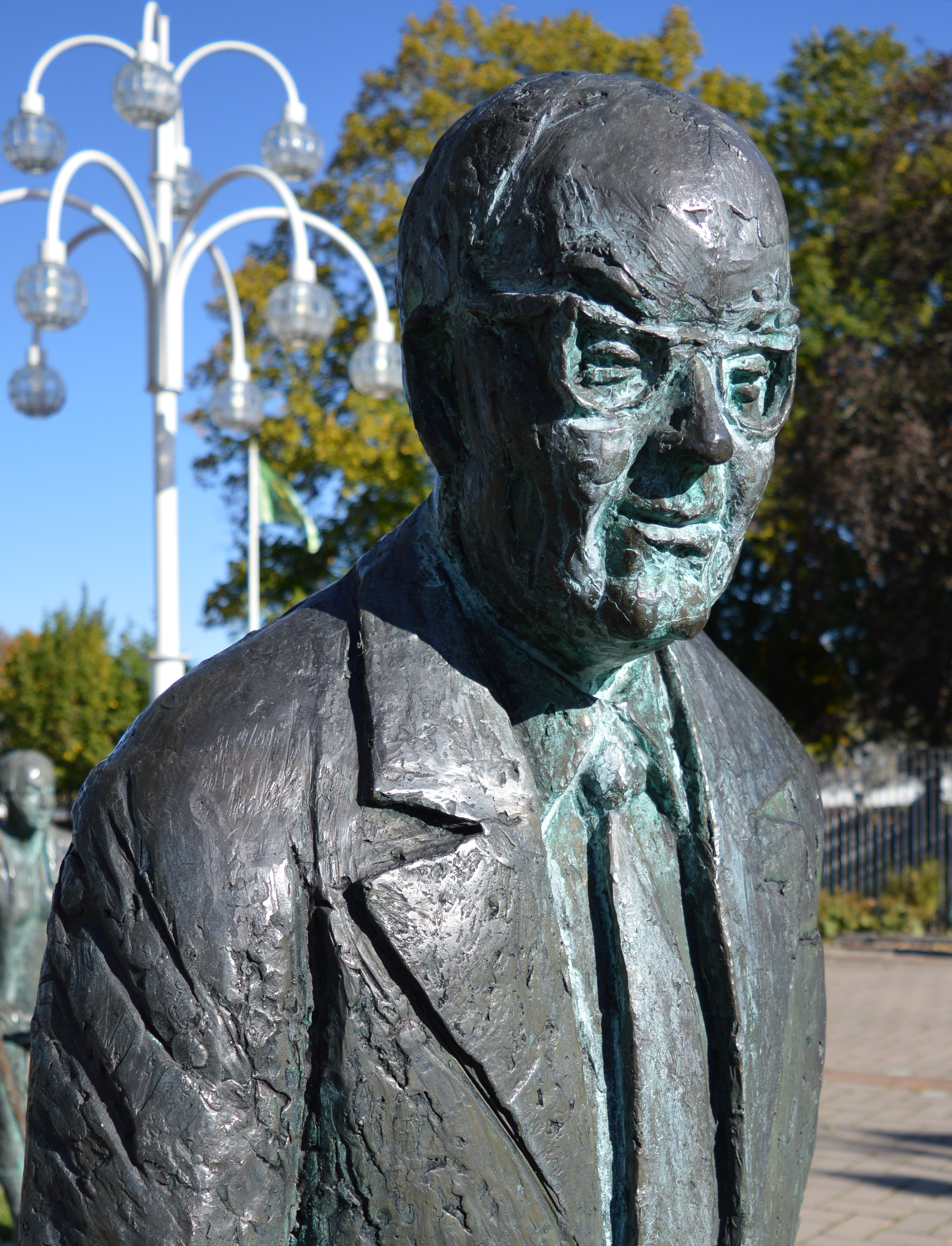 Skulpturen Ju mer vi är tillsammans av Herman Reijers år 1988.